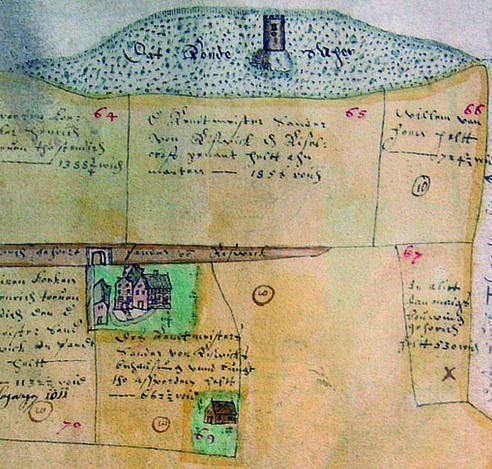 Ausschnitt aus einer Karte von Haus Aspel in Rees in einem Deichbuch aus dem Jahr 1587